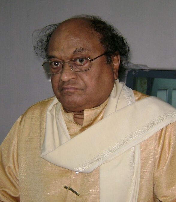 సింగిరెడ్డి నారాయణరెడ్డి